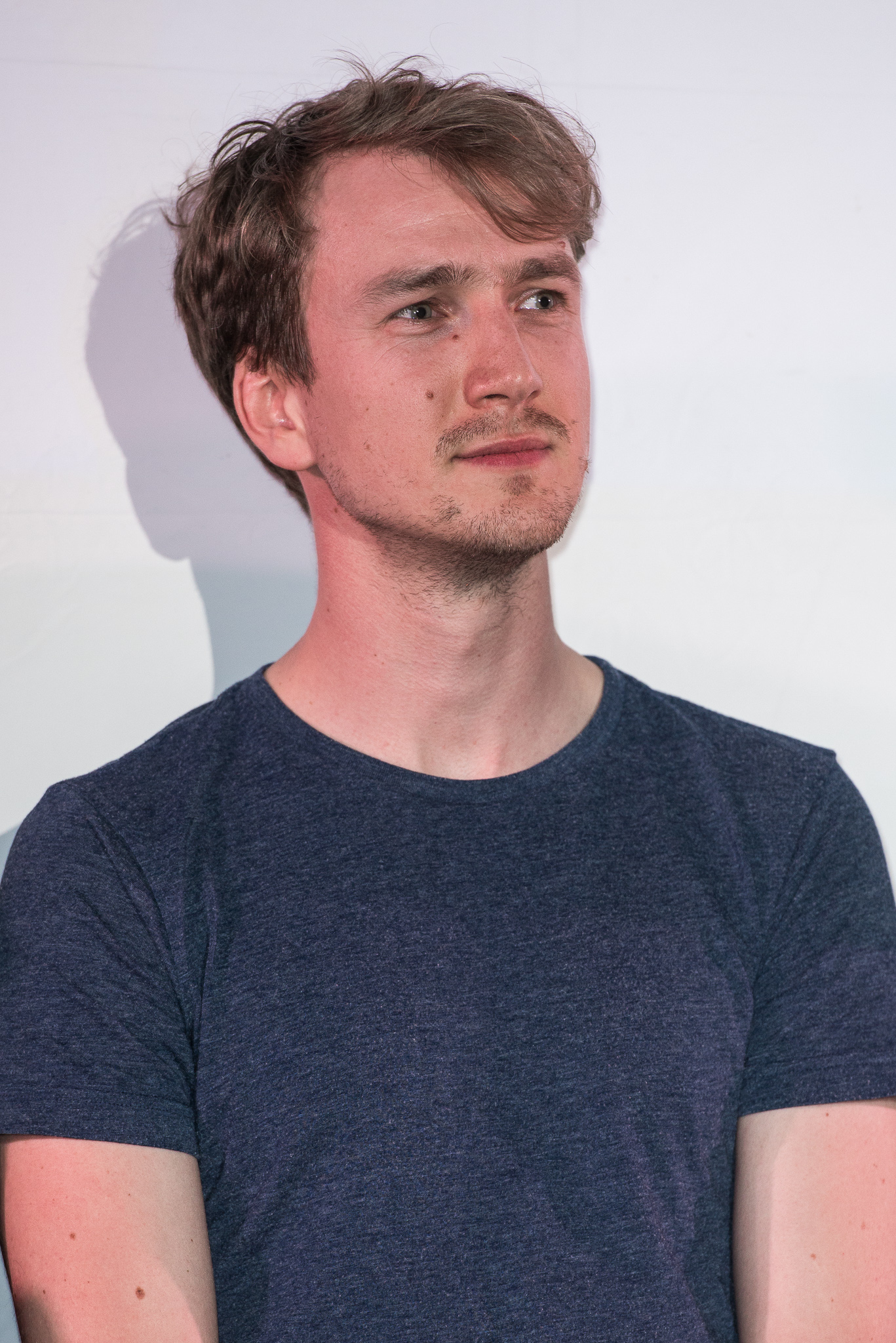 BR,Bayerischer Rundfunk,Das Recht sich zu sorgen,Franken-Tatort,Jan Krauter,Jan Lennart Krauter,Preview,Tatort